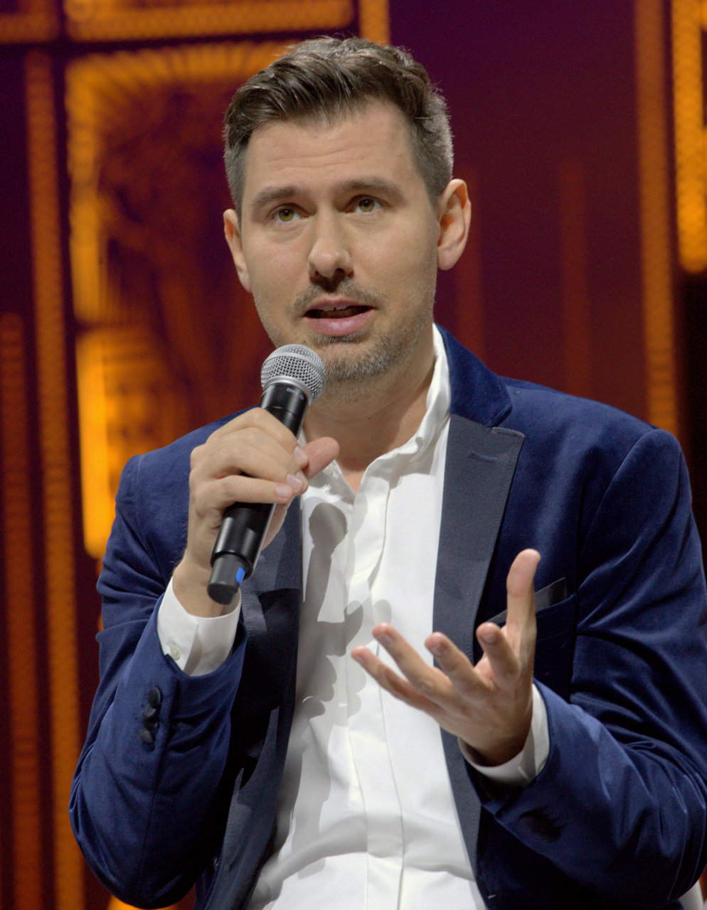 Táncos, koreográfus és rendező Vági Bence itt, a müncheni Circus Krone